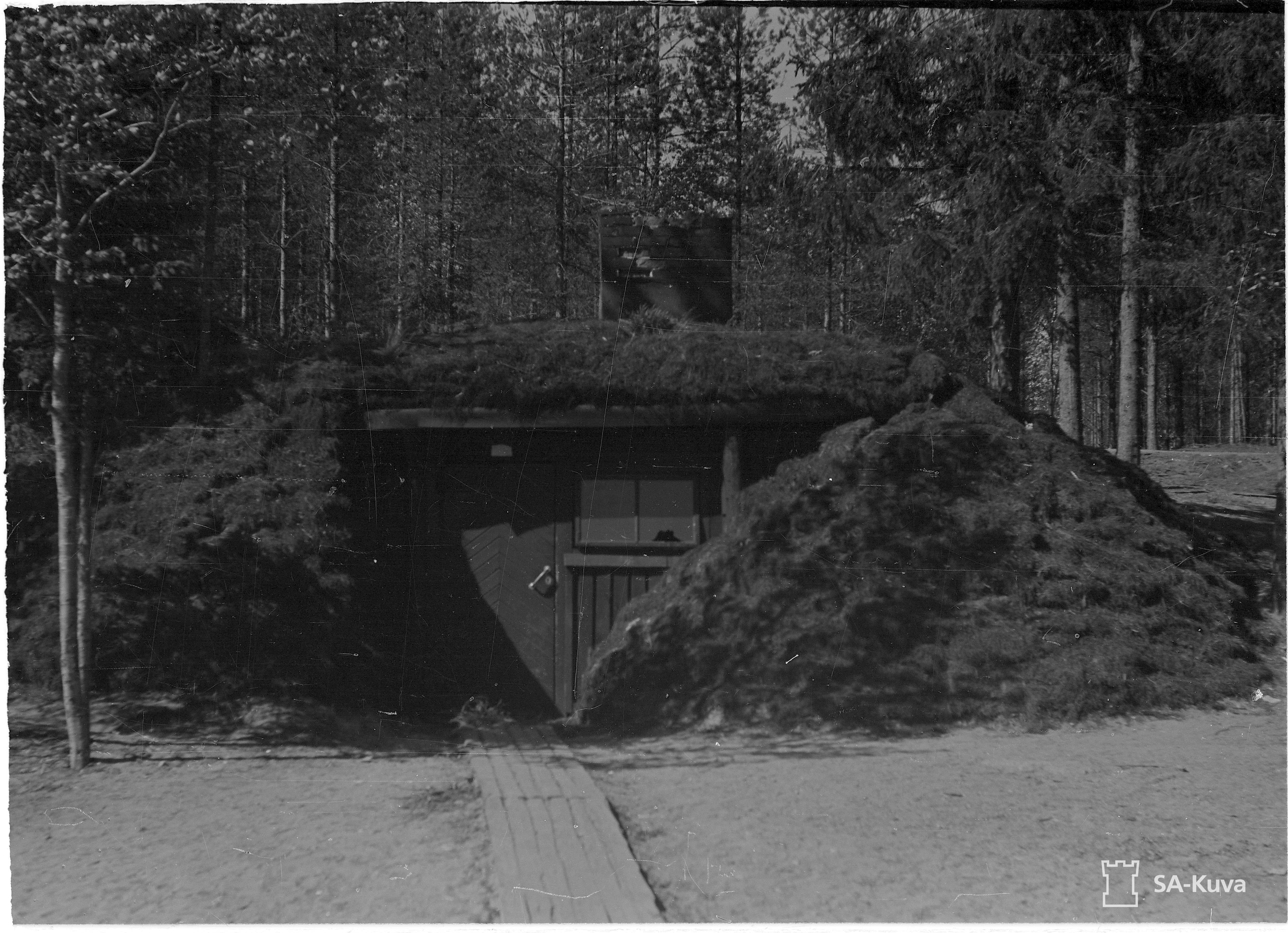 Hollolan lentokentän maasauna Kastarjärven rannalla.